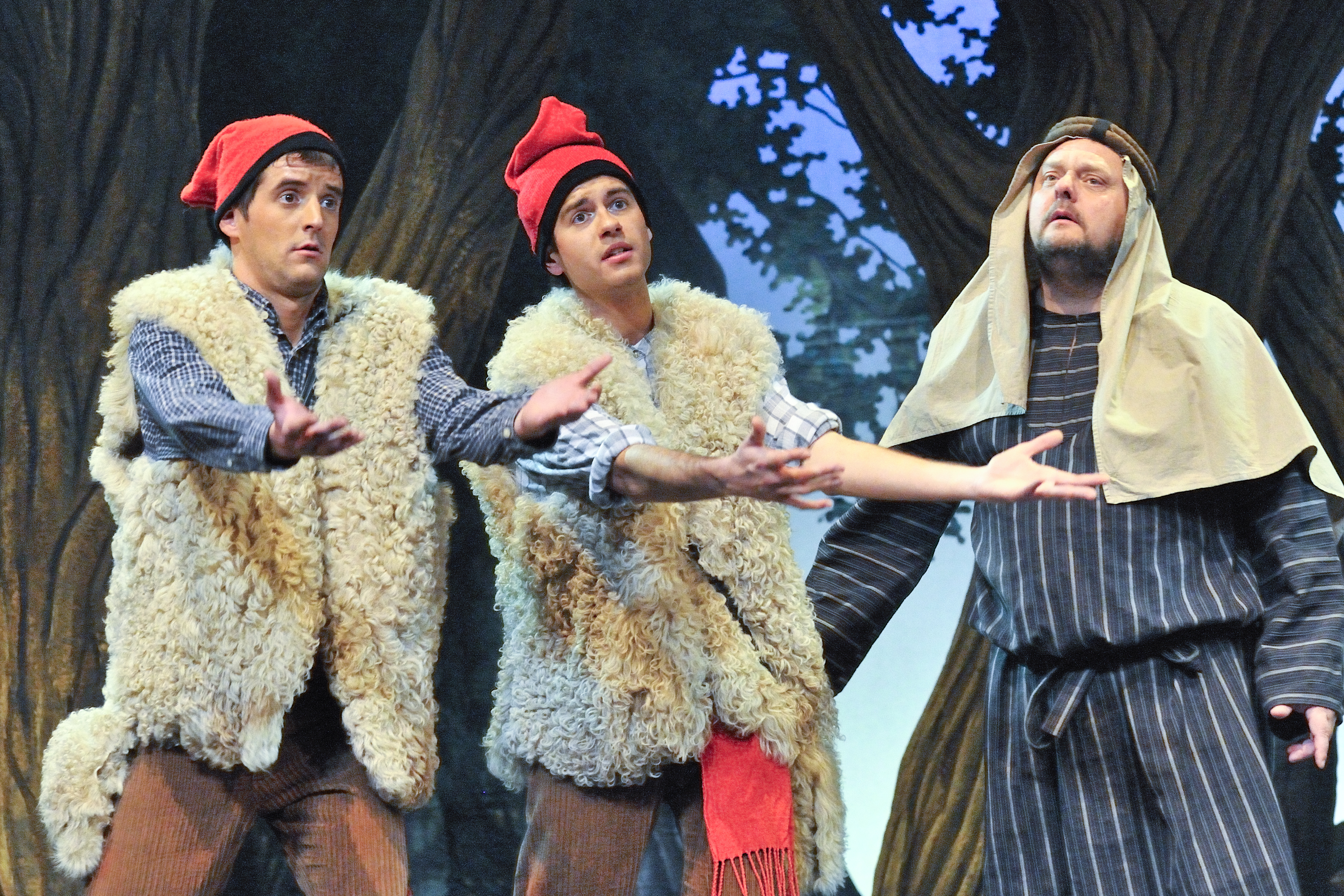 Escena del Jeremies